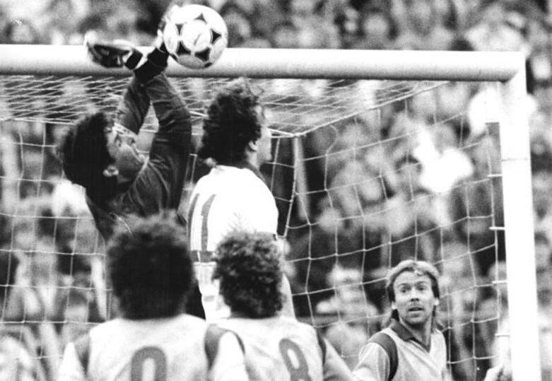 ADN-ZB-Häßler- -31.3.89-mx-Dresden: 20. Spieltag der Fußball-Oberliga- Dynamo Dresden - 1.FC Lok Leipzig 3:0 (0:0)- In dem vorgezogenen Spiel wehrt Leipzigs Nationaltorhüter Rene Müller einen Dresdner Angriff vor Oberliga-Torschützenkönig Torsten Gütschow (11) ab, der in der 53. Minute das 1:0 erzielt hatte. Seine Teamkammeraden Uwe Bredow (r.), Olaf Marschall (9) und Torsten Kracht (8) beobachten die Szene.